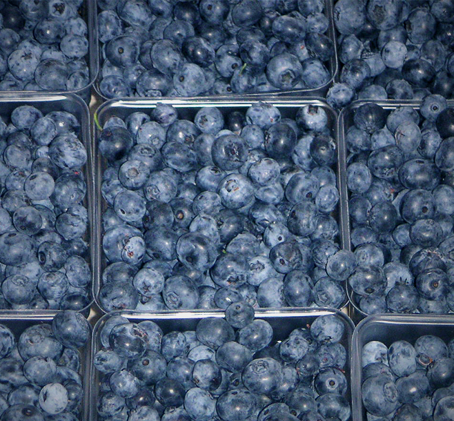 Blueberries at Farmer's Market